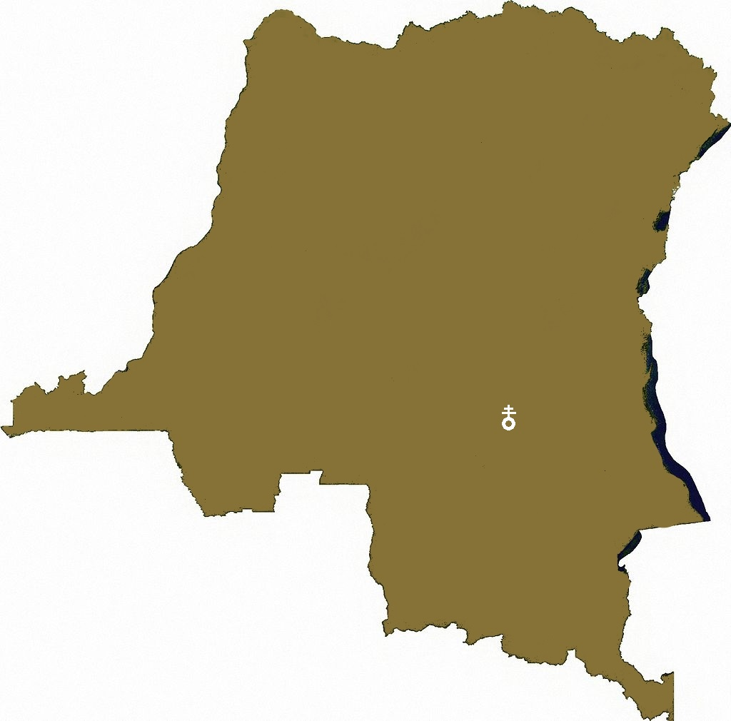 kaart congo